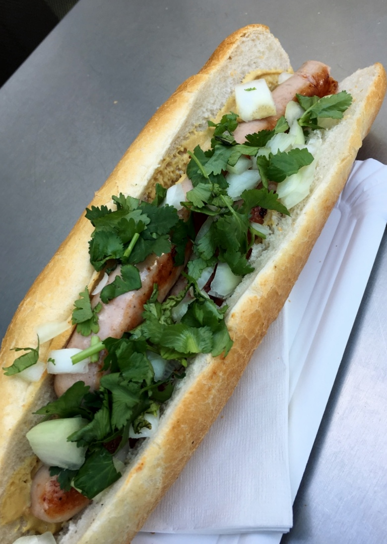 Bosna mit 2 Bratwürsten, Wien 2017